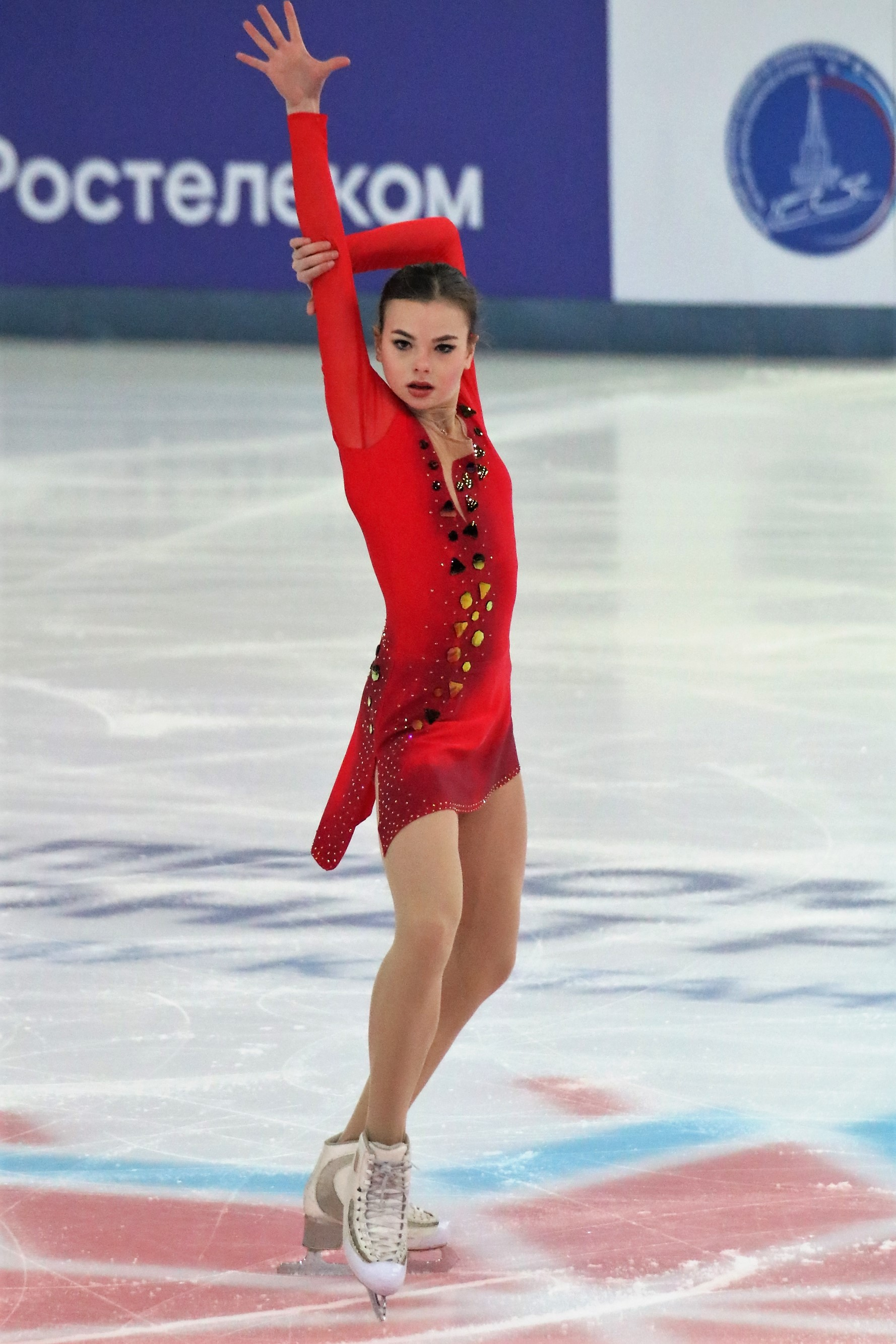 Анастасия Тараканова на чемпионате России по фигурному катанию на коньках 2019